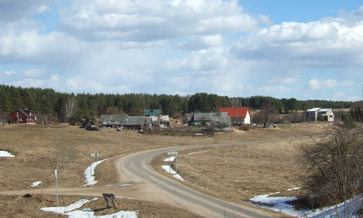 Varnikų kaimas